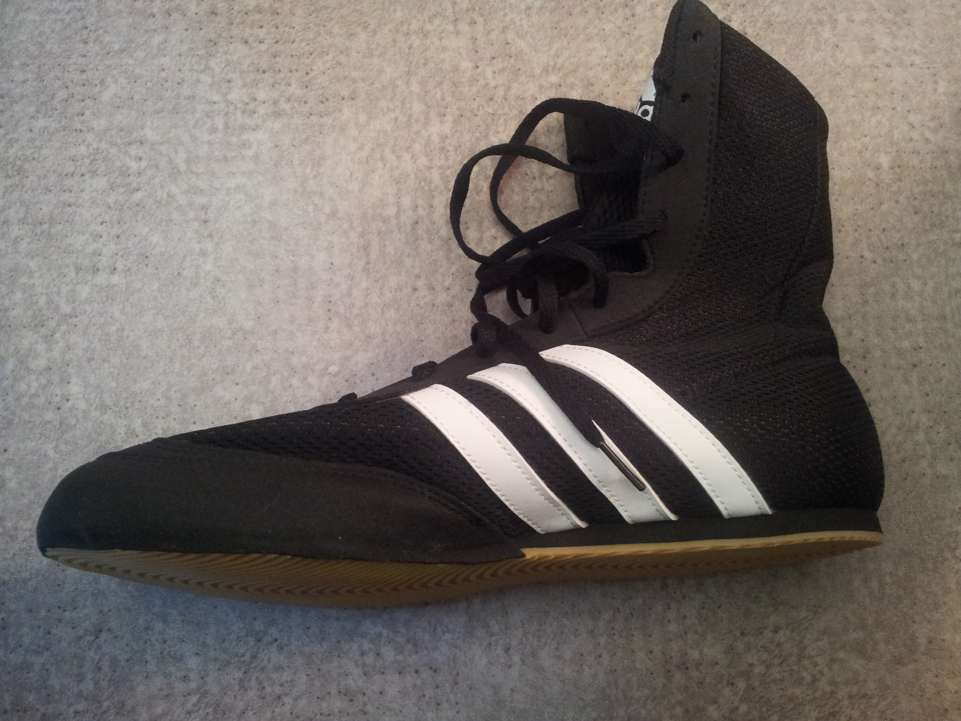 Chaussure de savate boxe française homologuée par la fédération de ce sport.